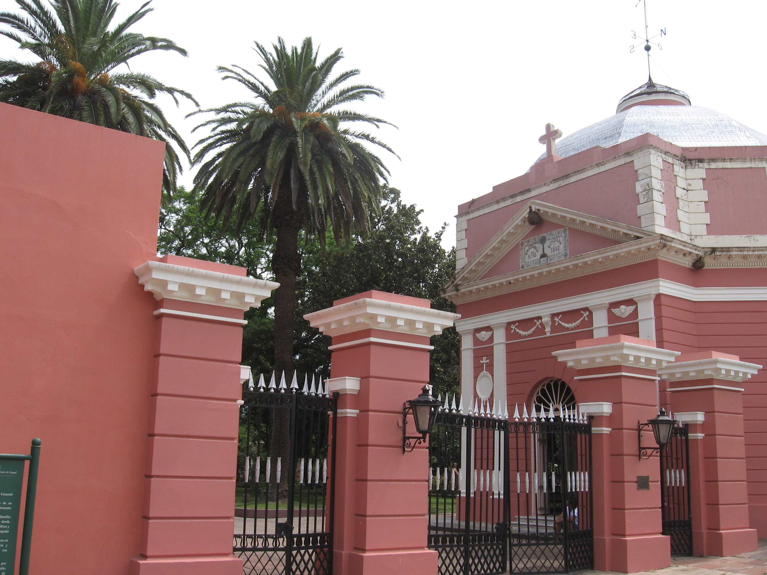 Entrada al Palacio San José